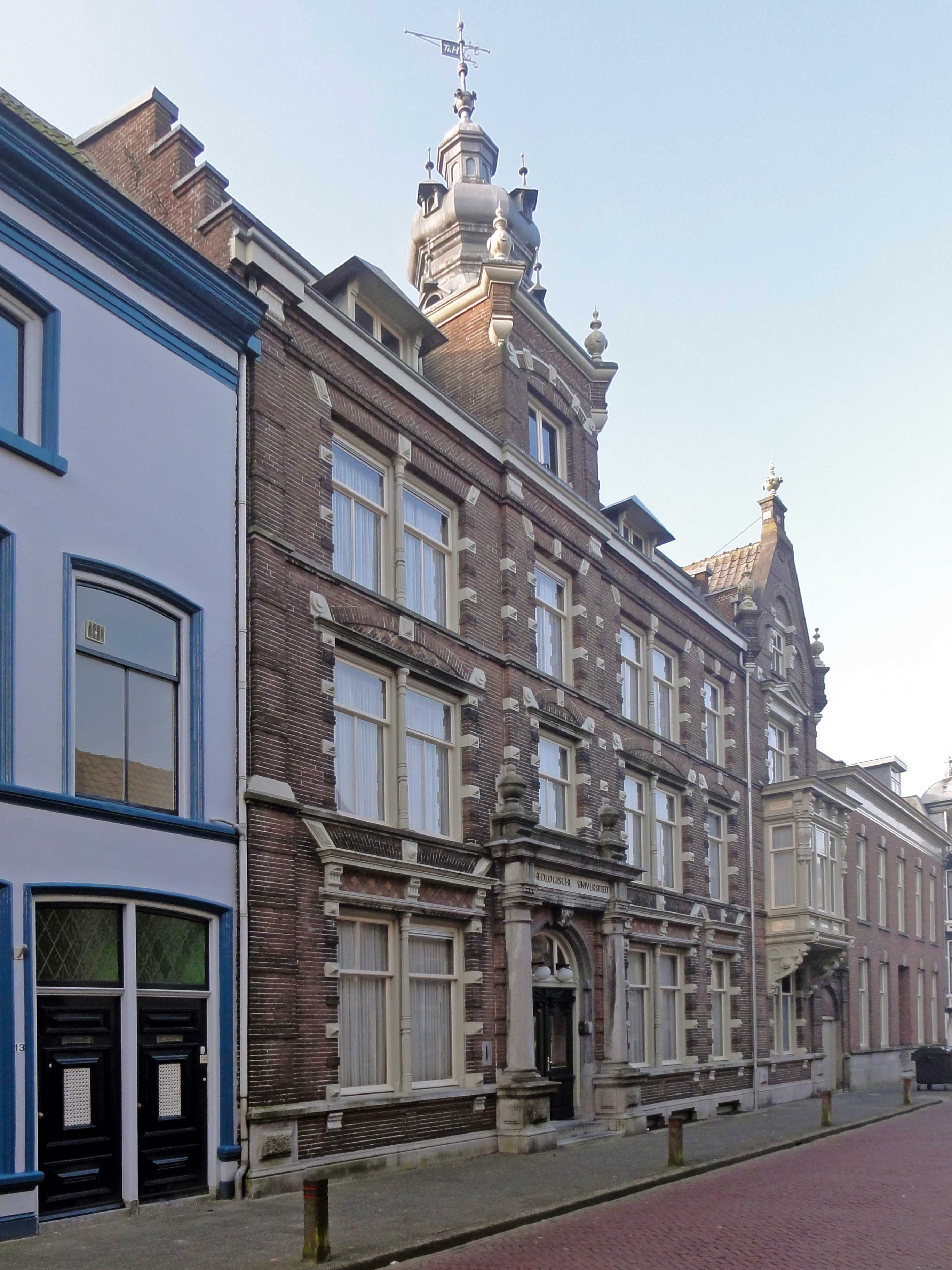 Theologische Universiteit Kampen (vrijgemaakt - Broederweg